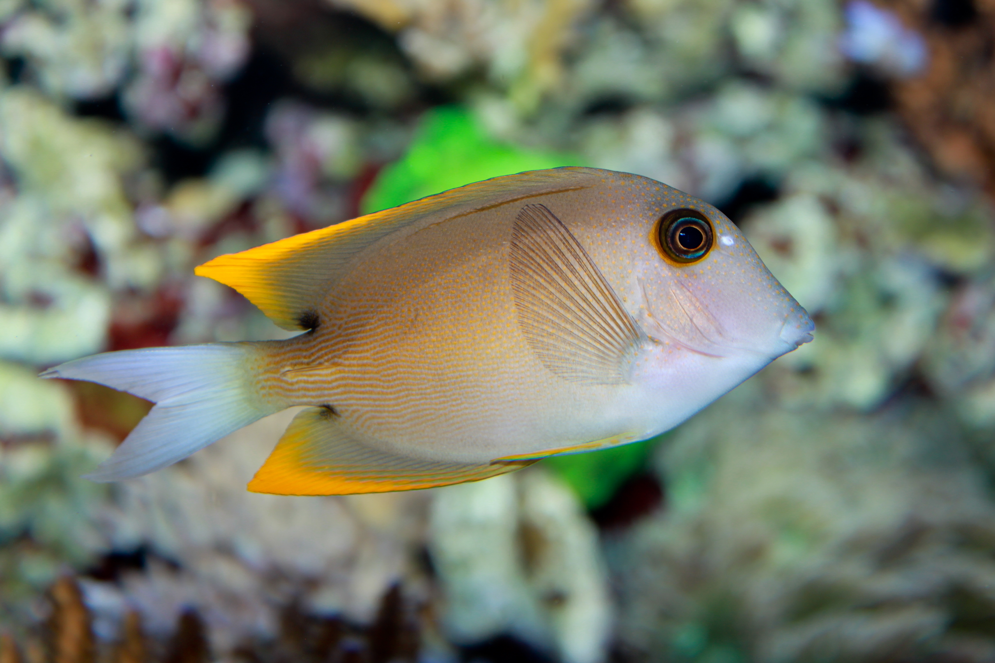 Tomini-Borstenzahndoktorfisch (Ctenochaetus tominiensis)